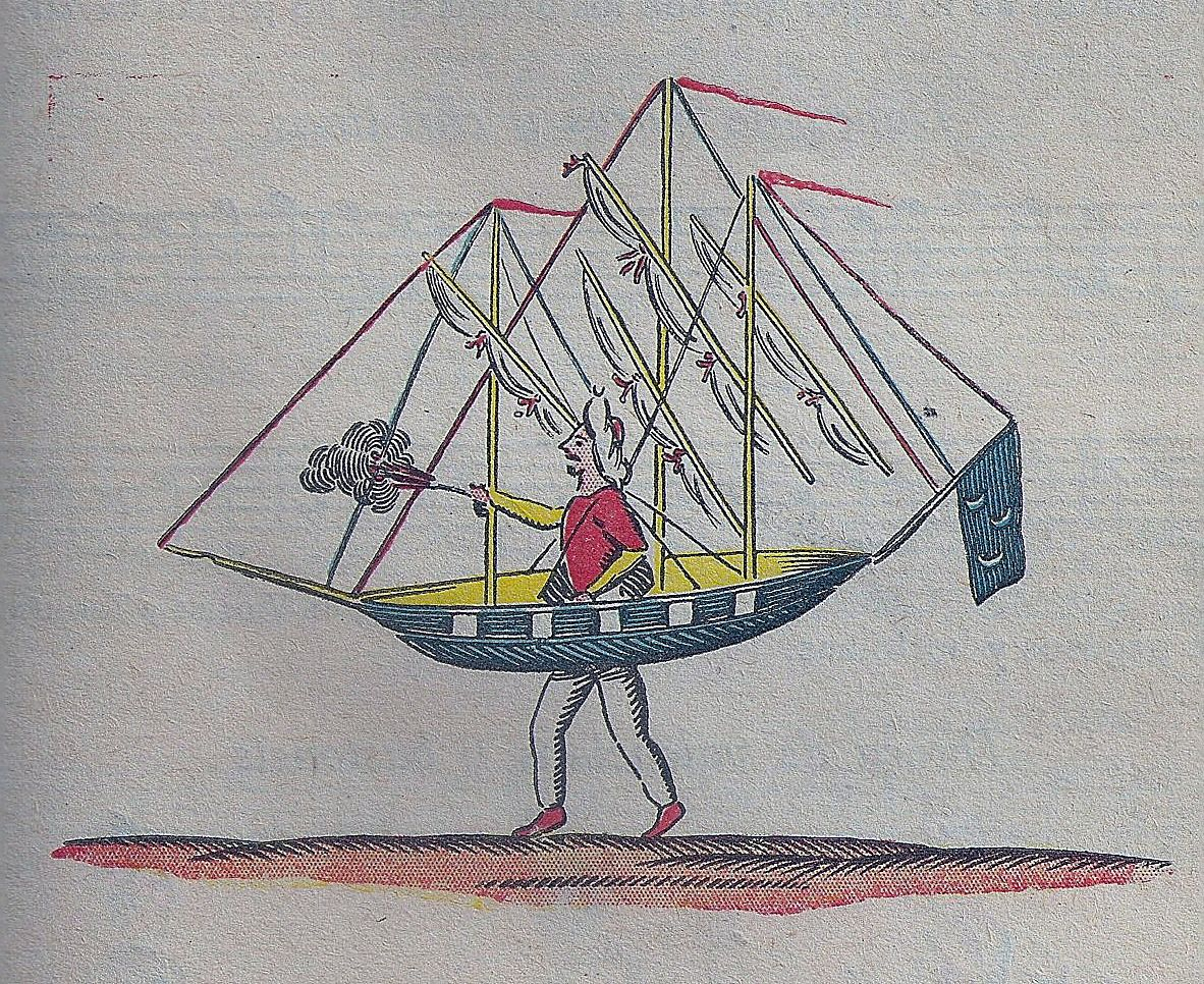 Dibuix del Ball de Galeres de Reus realitzat per Andreu de Bofarull abans del 1880